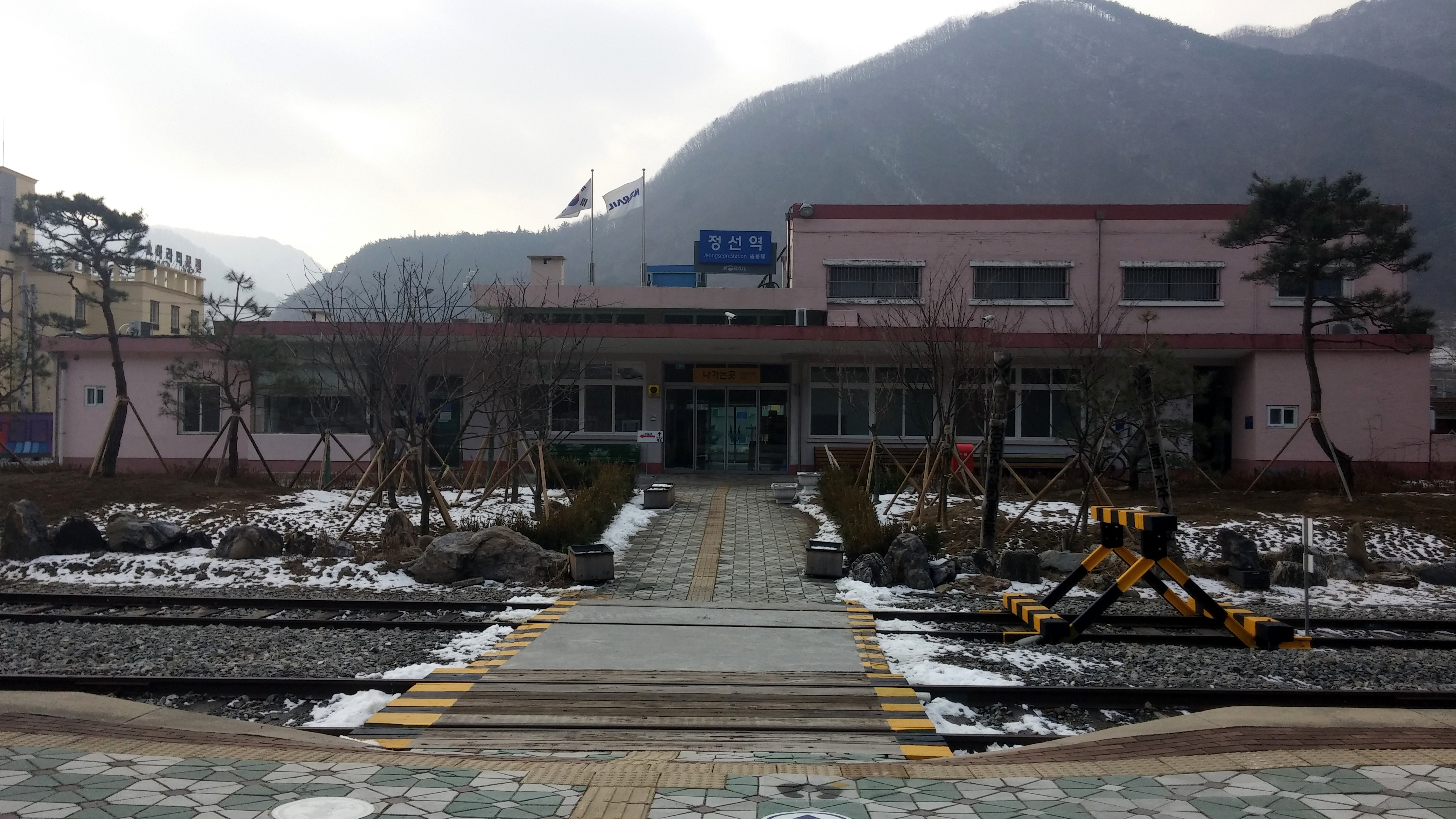 한국철도공사 정선역 역사(선로측).